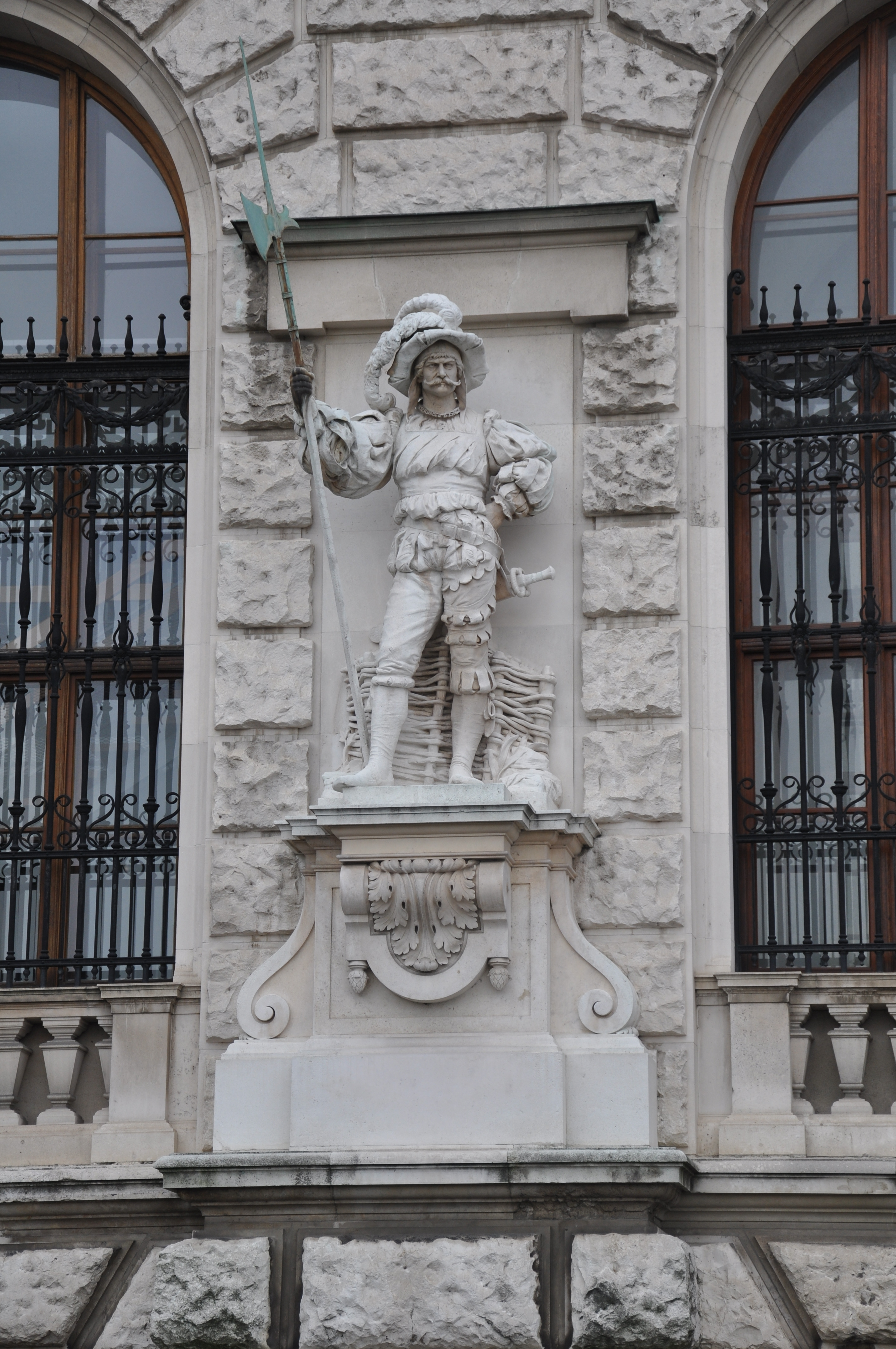 Wien, Neue Burg, Statuen an der Hauptfassade am Heldenplatz, zwanzig Gestalten der österreichischen Geschichte (verschiedene Bildhauer), 1895–1901 Nr. 15: Anton Schmidgruber: Landsknecht